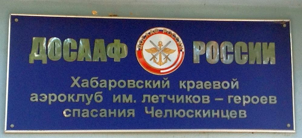 Эмблема аэроклуба на входе